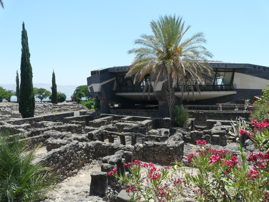 Dies Kirche hat eine sehr interessante Architektur. Der achteckige Bau steht auf ebenso vielen Säulen und "schwebt" damit quasi über der Ausgrabungsstätte.